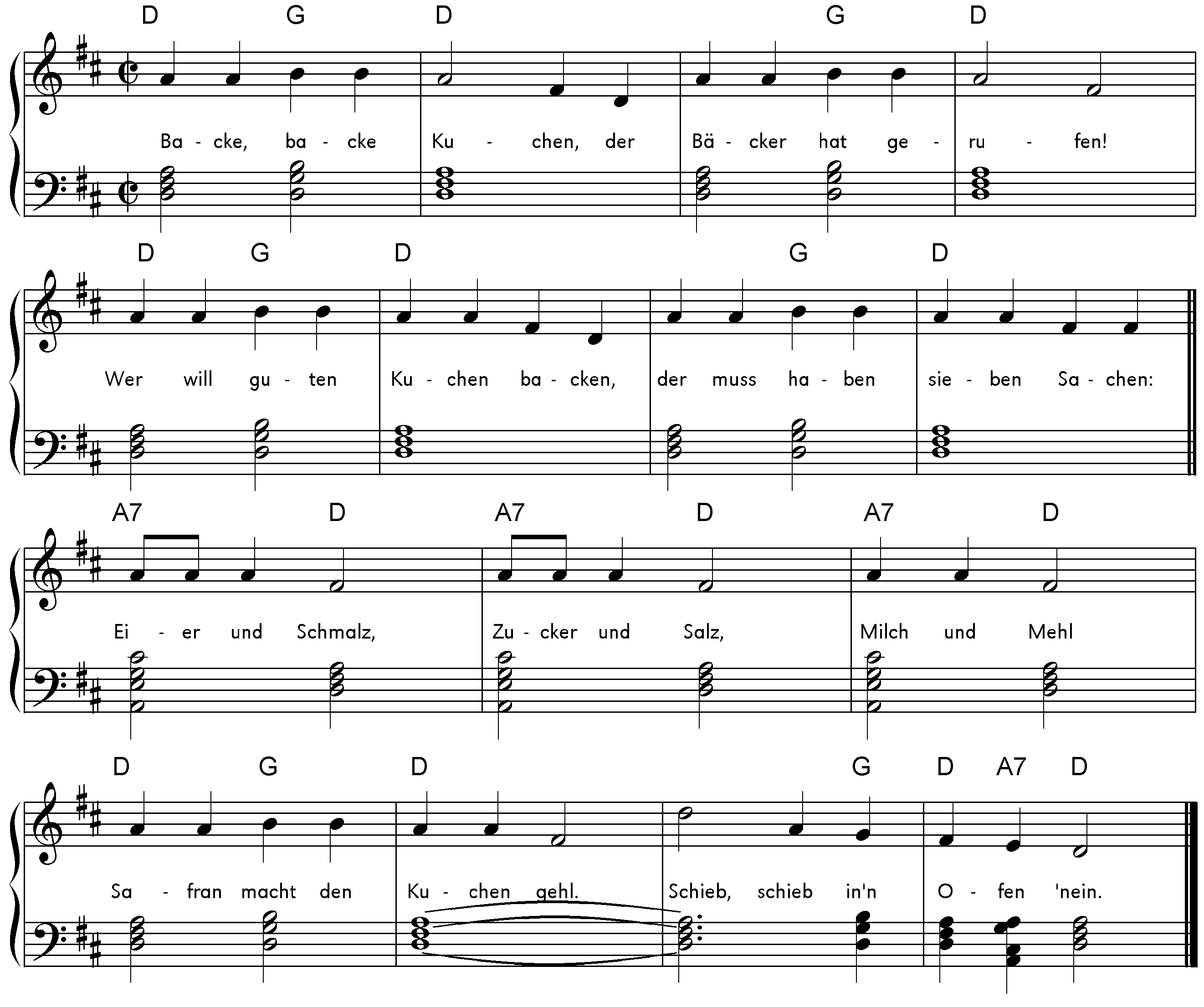 Backe, dt. Kinderlied, wahrscheinlich 19. Jh., Notenbeispiel mit einfachen Klavierakkorden, Akkordsymbolen und Text